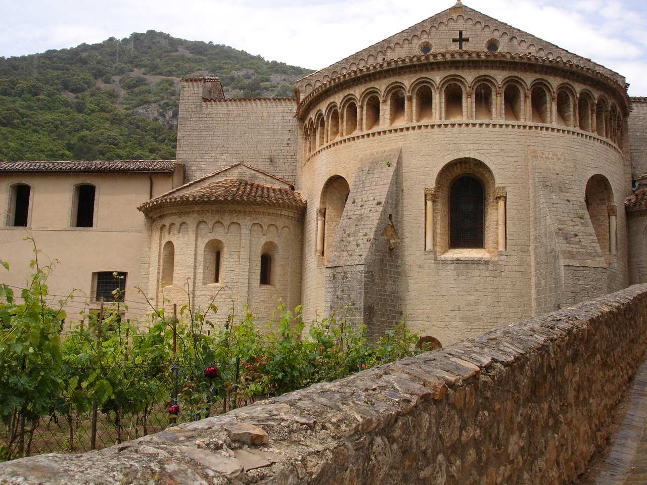 Saint-Guilhem-le-Désert (Hérault) : Vue du chevet de l'église romane